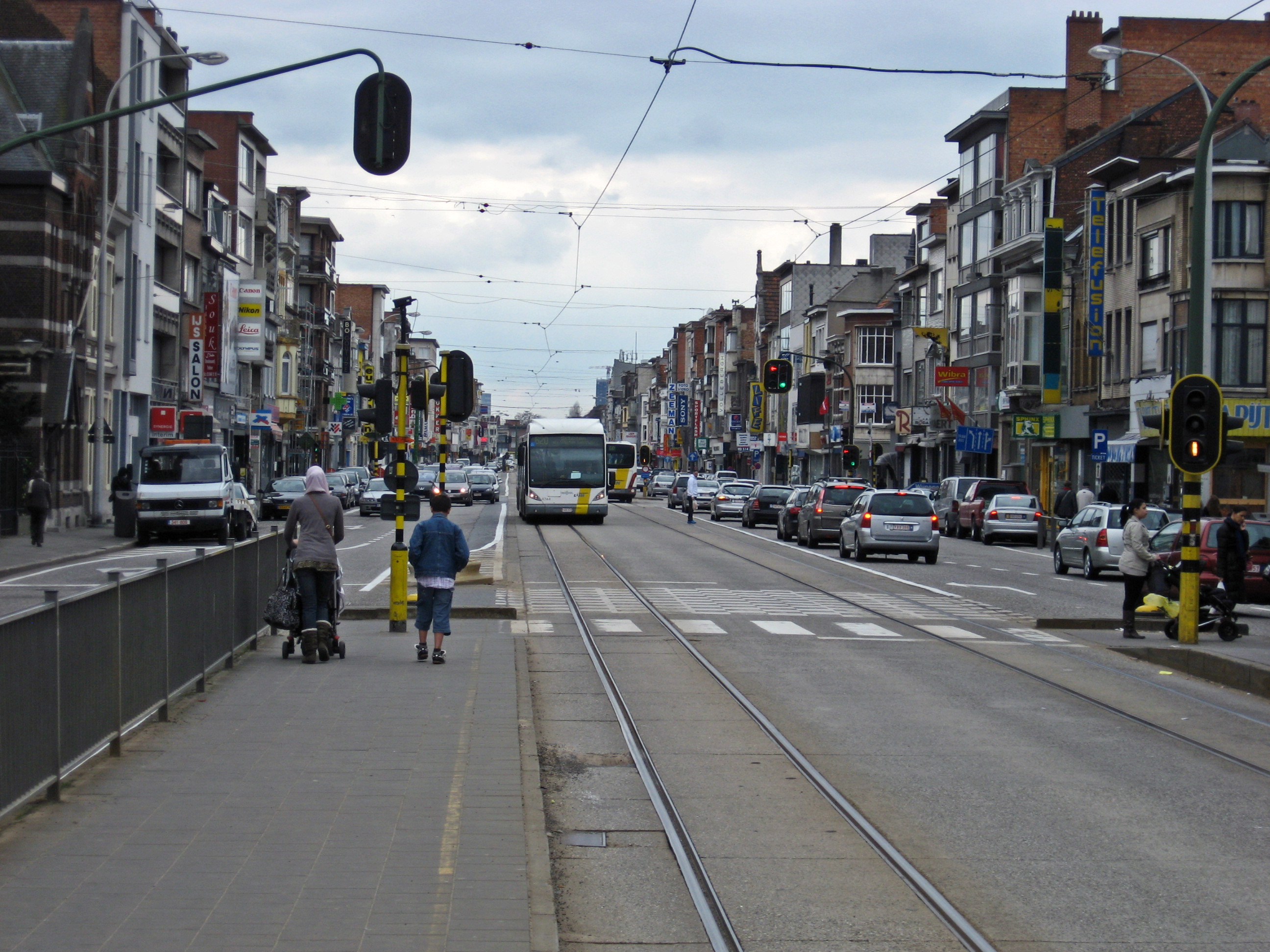 De Bredabaan op een rustige zondagmiddag